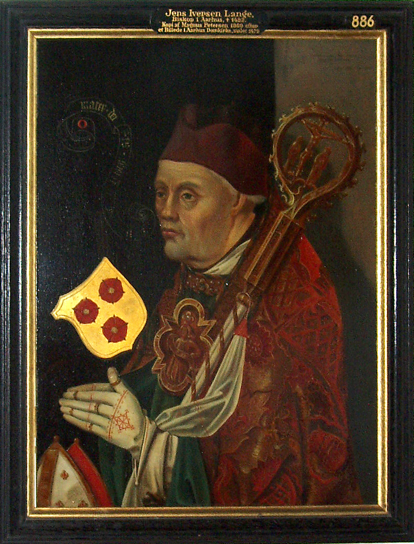 Jens Iversen Lange bishop in Aarhus 1449-1482, Denmark. copy on Frederiksborg Slot Biskop i Aarhus †1482 Kopi af magnus Petersen 1869 efter et billede i Århus Domkirke malet 1470